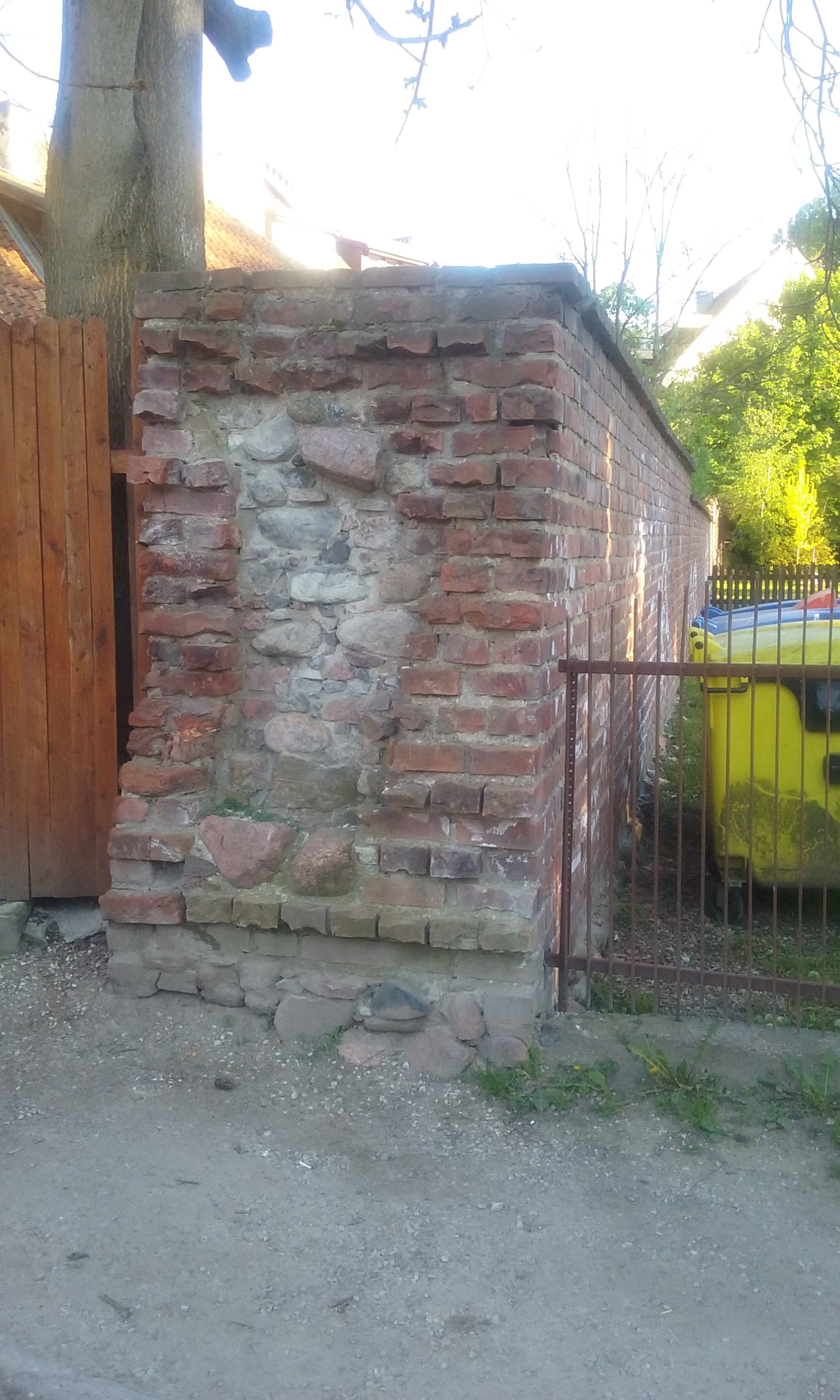 Fragment muru obronnego Olsztyna przy ul. Okopowej (przy przedszkolu).